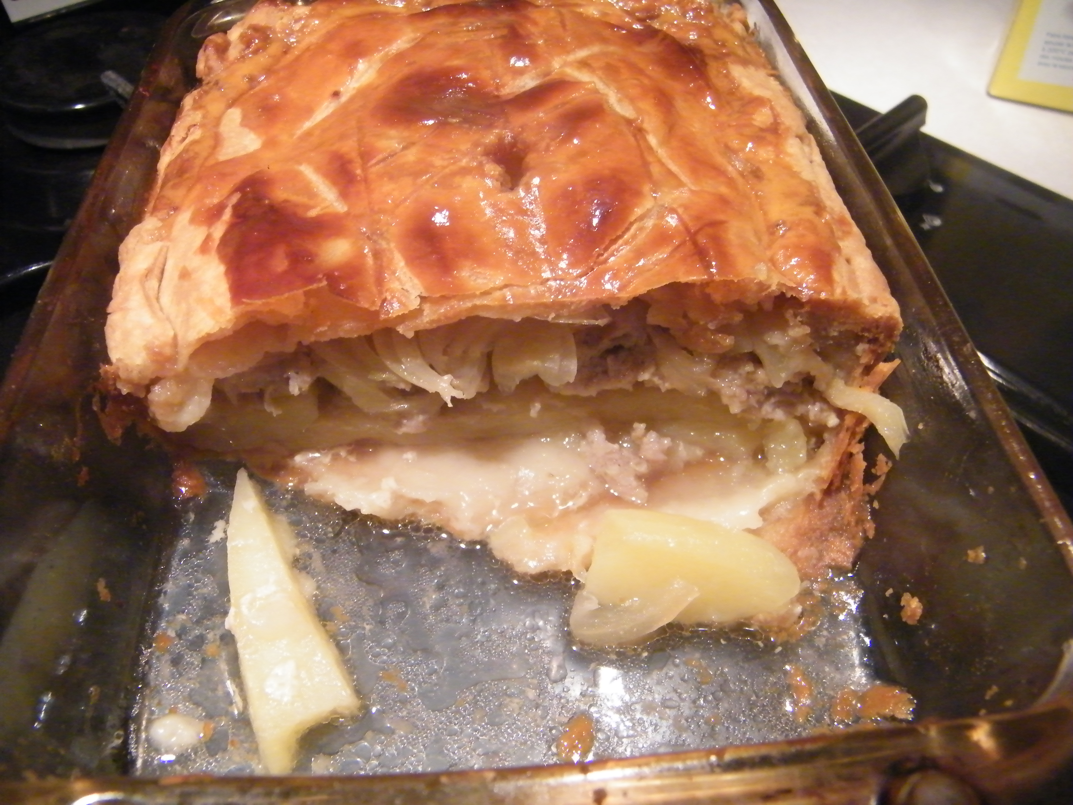 Bisteux picard.